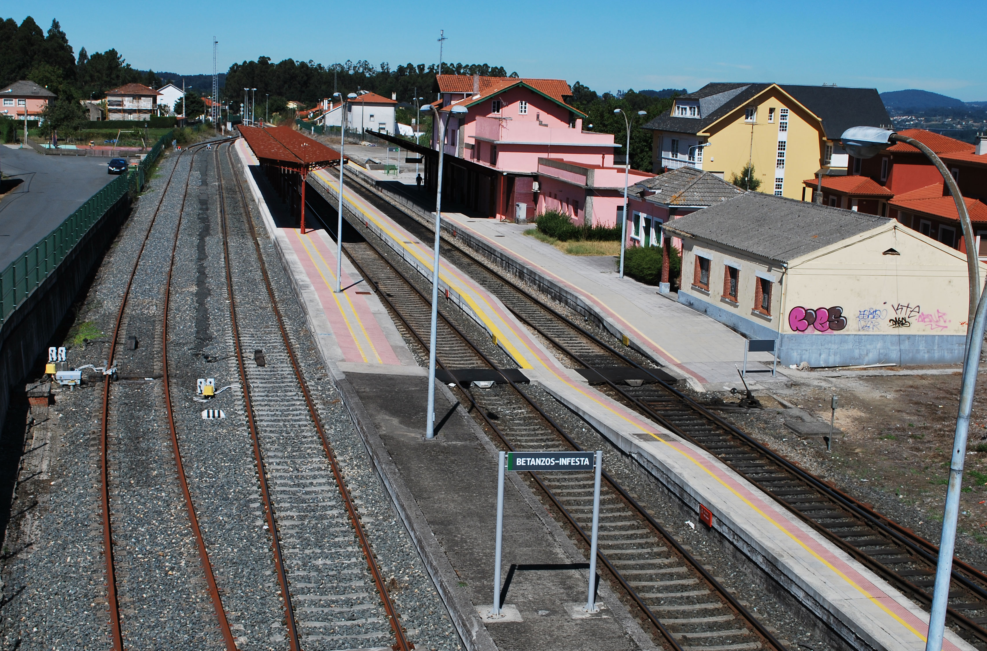 Estación de Betanzos Infesta A Coruña Galiza Spain